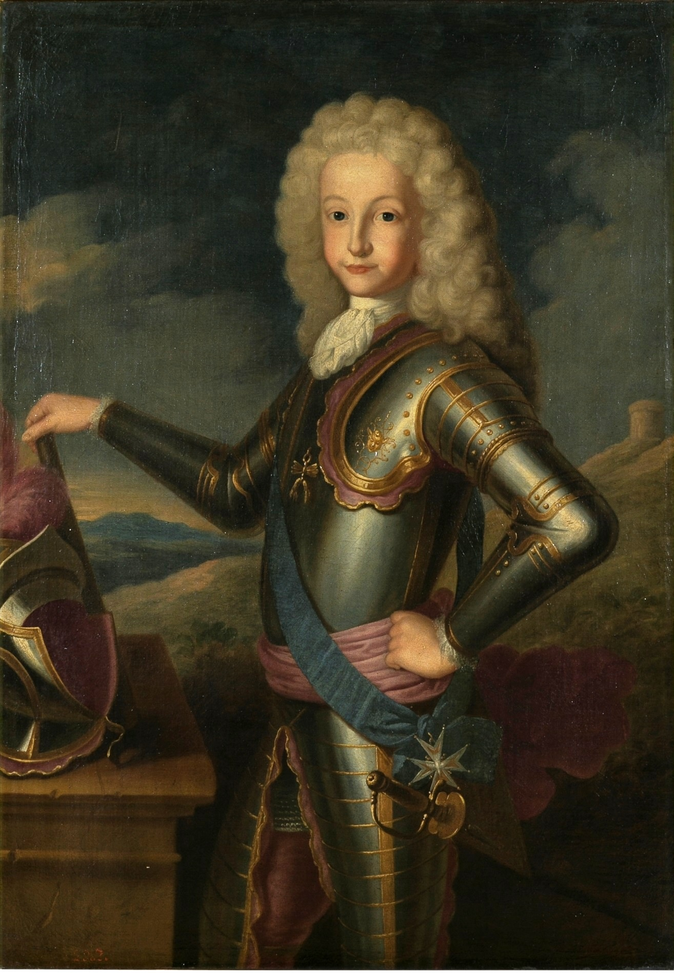 Retrato del rey Luis I de España (1707-1724), que fue hijo del rey Felipe V de España y de la reina María Luisa Gabriela de Saboya.